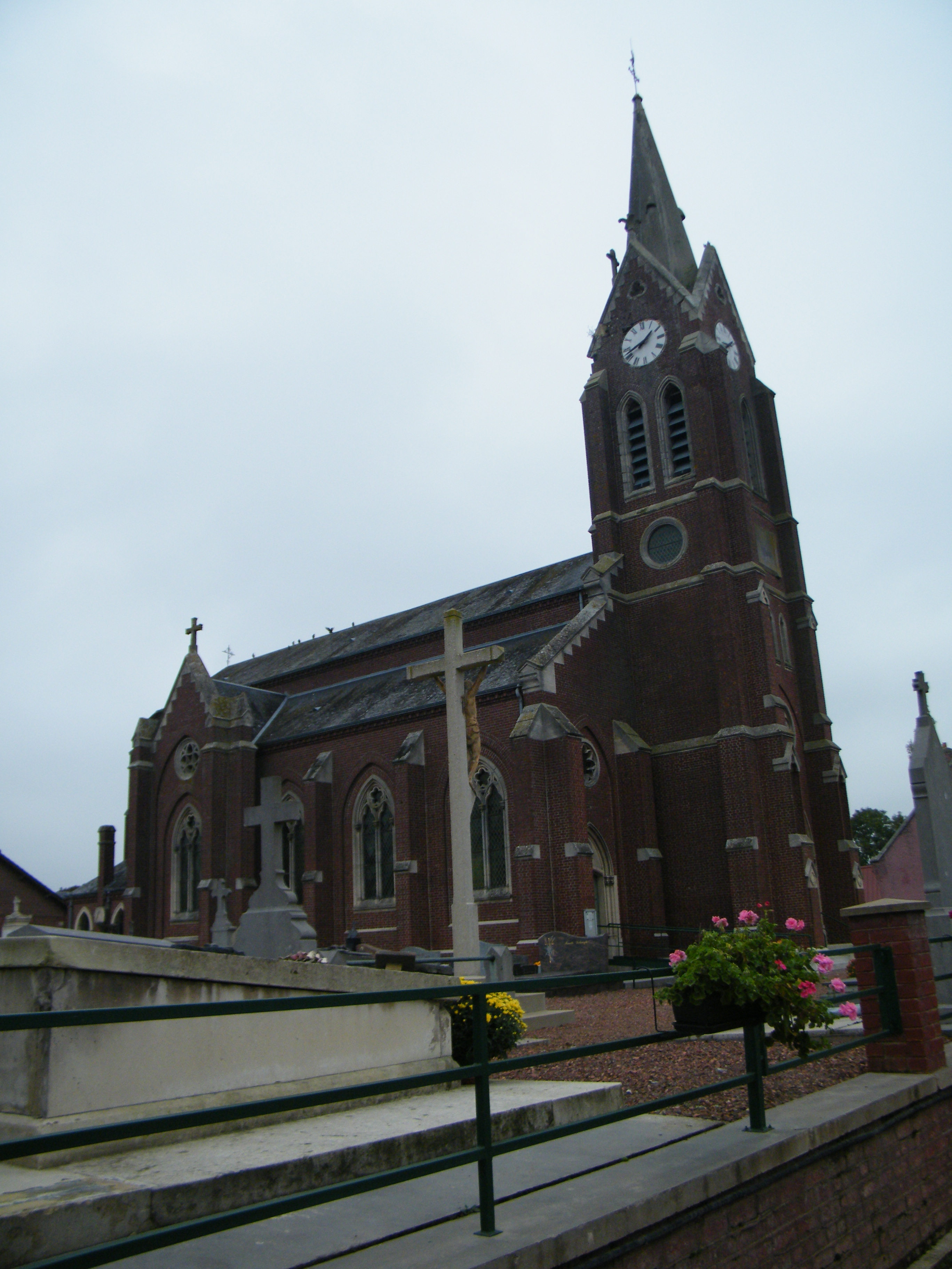 église.